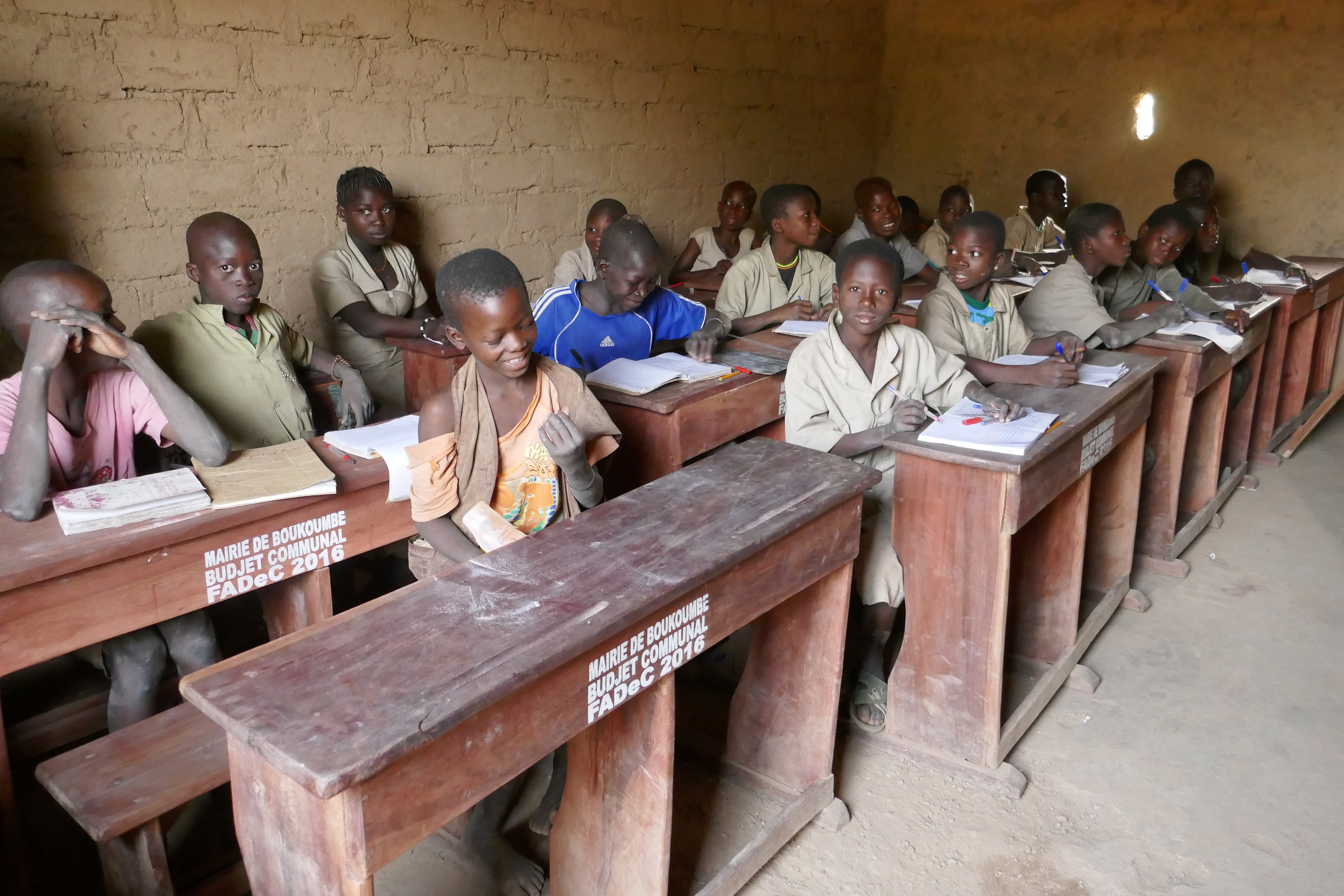 Ecole primaire publique de Dimatadoni (arrondissement de Manta, commune de Boukombé, Atakora, Bénin).